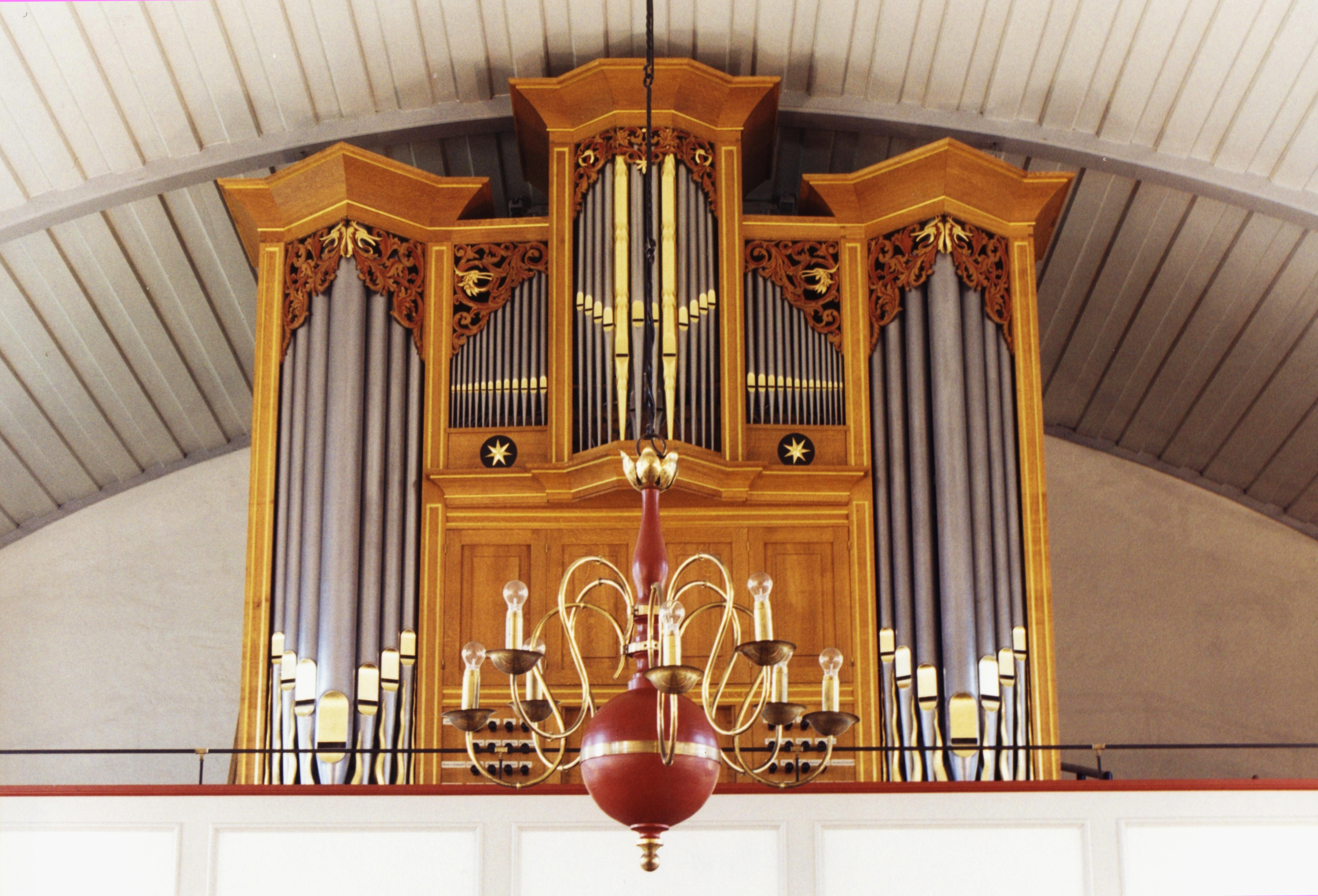 Orgel in Bremen-Walle, Deutschland